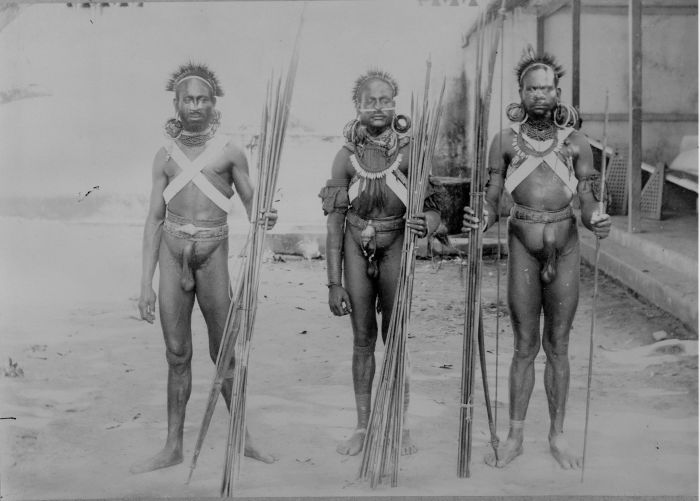 Foto. Drie Kaja-Kaja mannen van Zuid-Nieuw Guinea